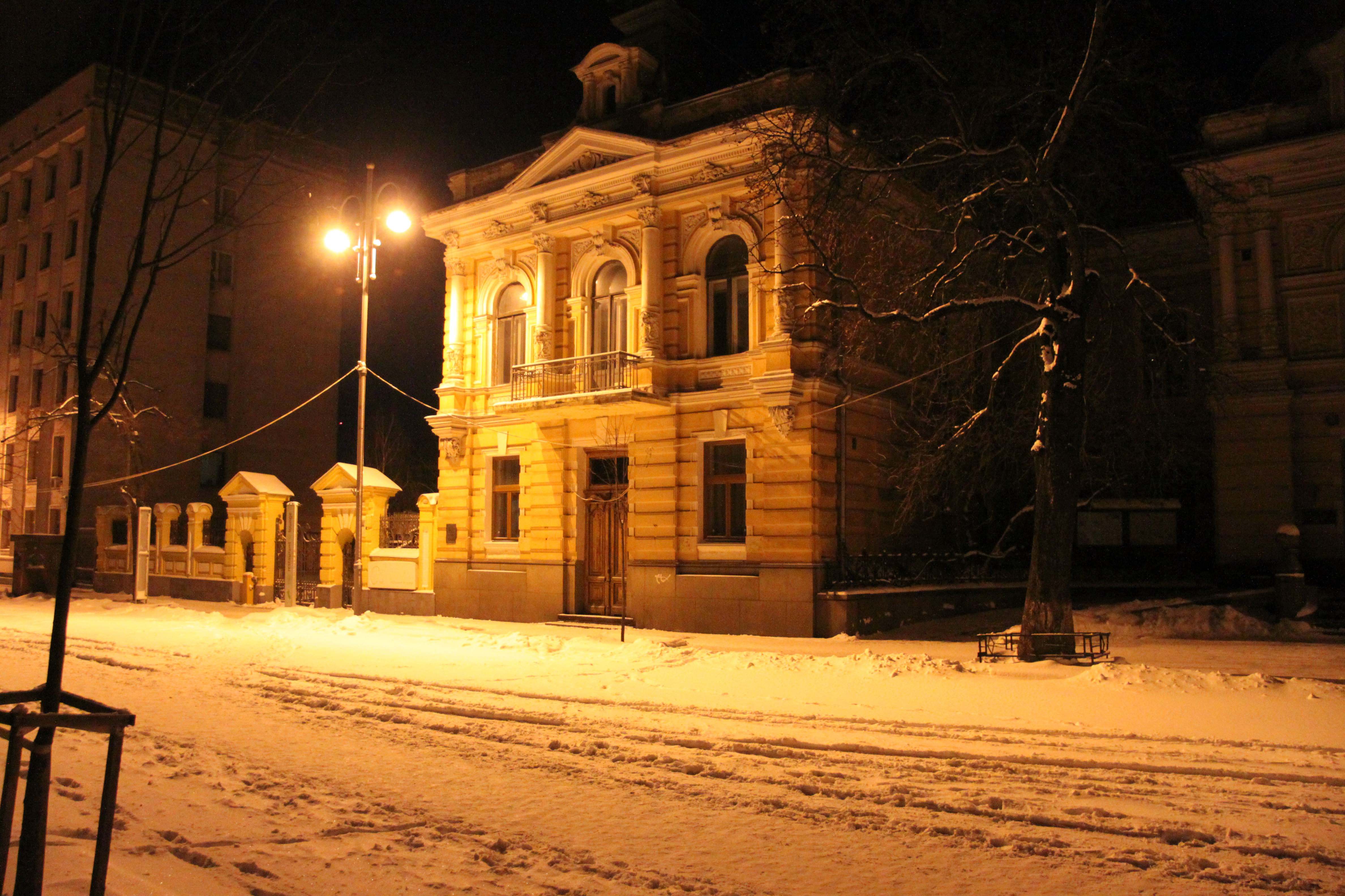 Особняк С. Лібермана, Банкова вул., 2, Київ